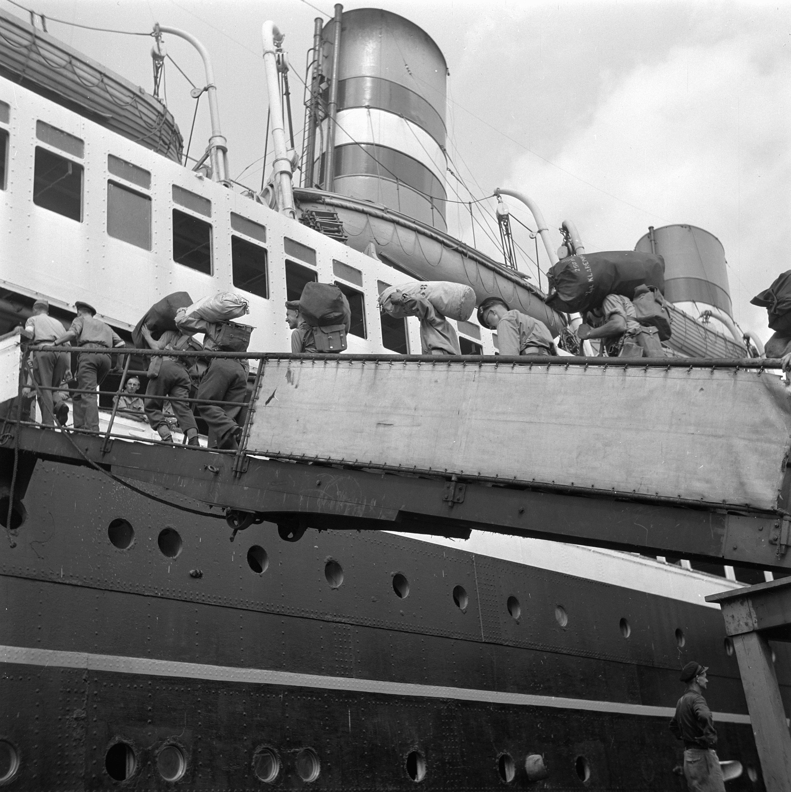 Collectie / Archief : Fotocollectie Anefo Reportage / Serie : [ onbekend ] Beschrijving : Vertrek "Volendam" met militairen Datum : 31 juli 1947 Trefwoorden : militairen, passagiersschepen, schepen Fotograaf : Hof, […] van 't / Anefo Auteursrechthebbende : Nationaal Archief Materiaalsoort : Negatief (zwart/wit) Nummer archiefinventaris : bekijk toegang 2.24.01.03 Bestanddeelnummer : 902-2844